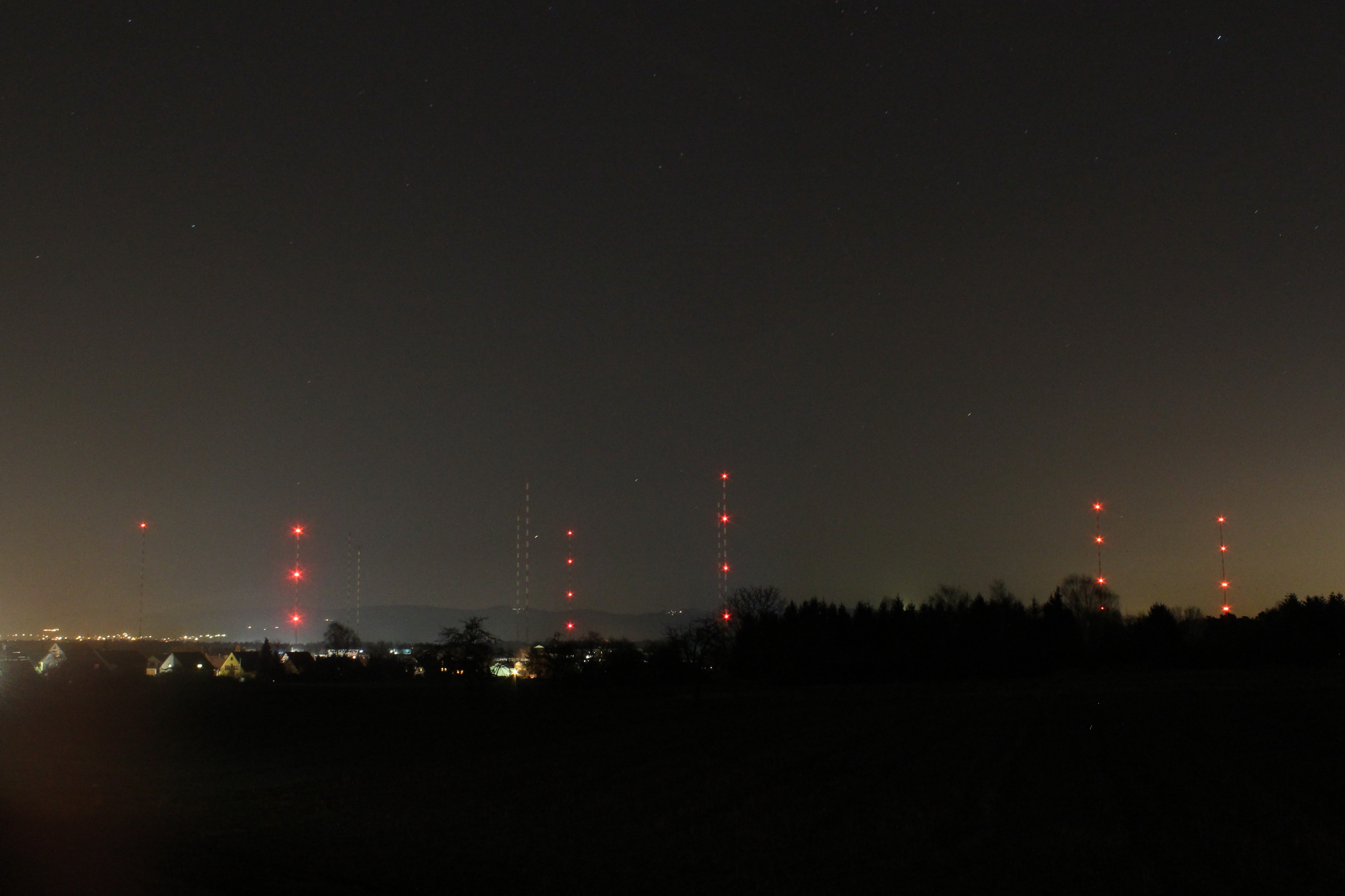 Sender Mainflingen bei Nacht